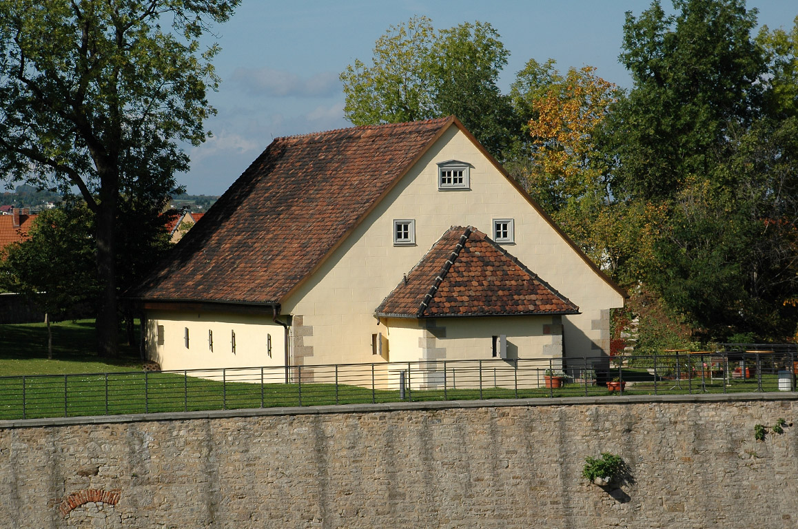 Friedenspulvermagazin Nr.5 (errichtet 1822) auf dem Ravelin Anselm der Zitadelle Petersberg in Erfurt